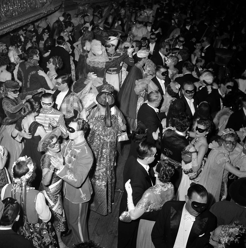 Gustav Adolfs Torg 2, Operan.